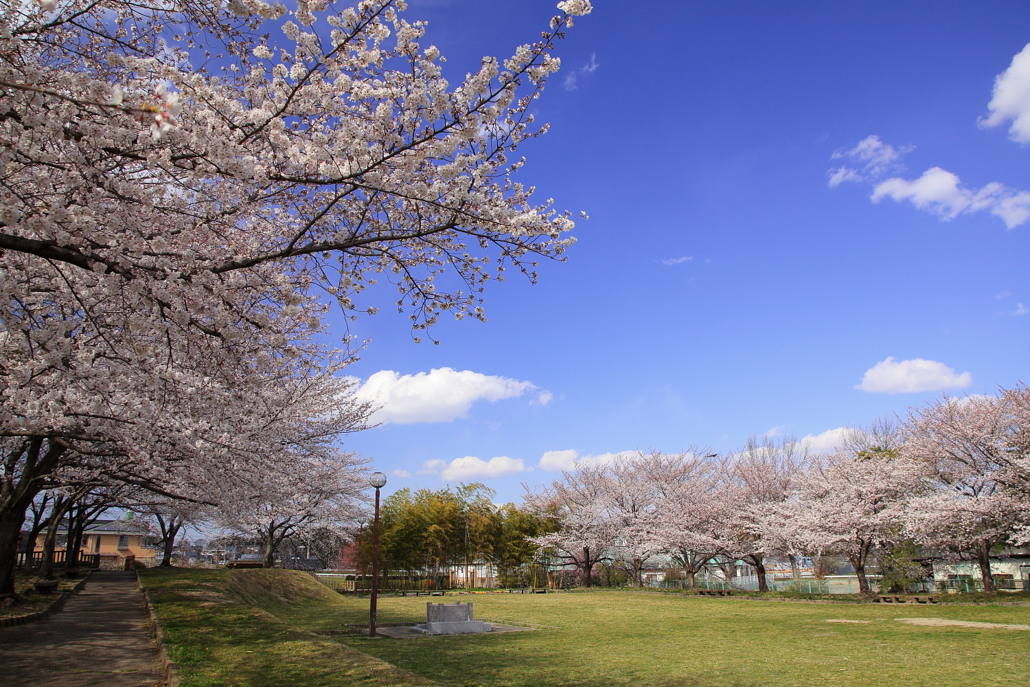 沓掛城址-本丸跡（豊明市沓掛町、2012年）